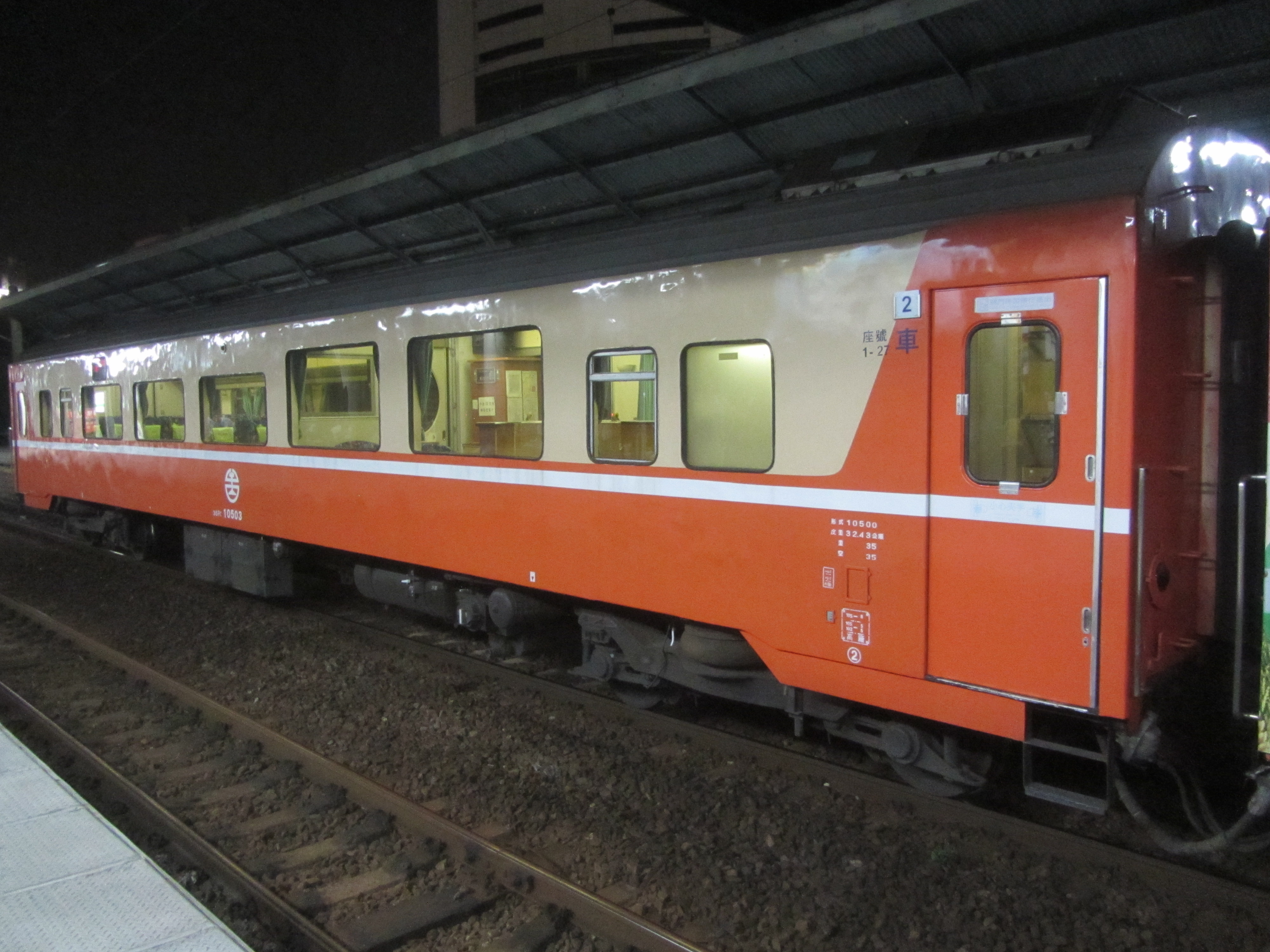 中文（台灣）: 臺灣鐵路管理局觀光列車編組中的35PC10503客廳車夜景。